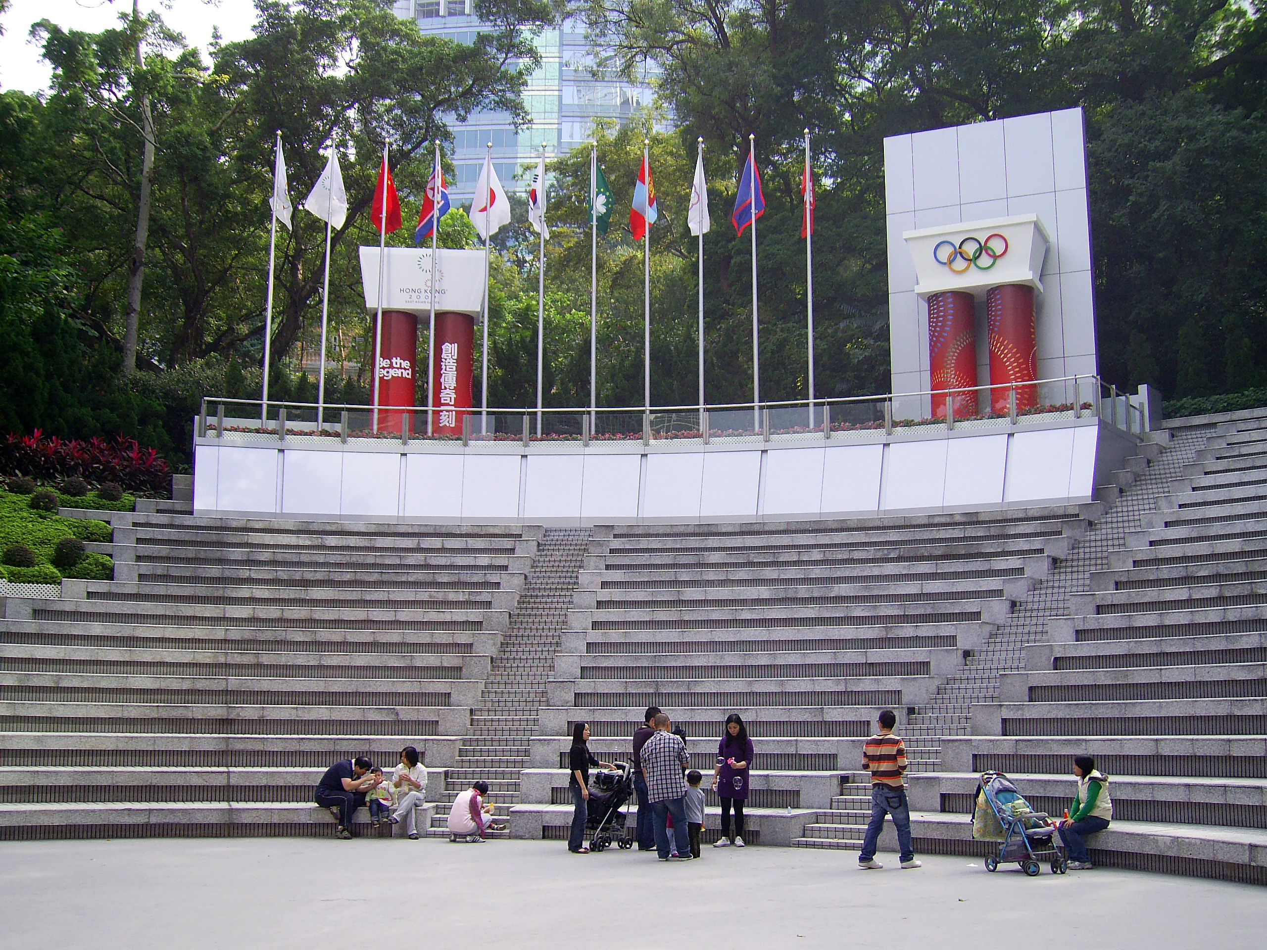 中文（香港）: 2009年東亞運動會參賽國的旗幟在香港公園內的「奧林匹克廣場」上飄揚